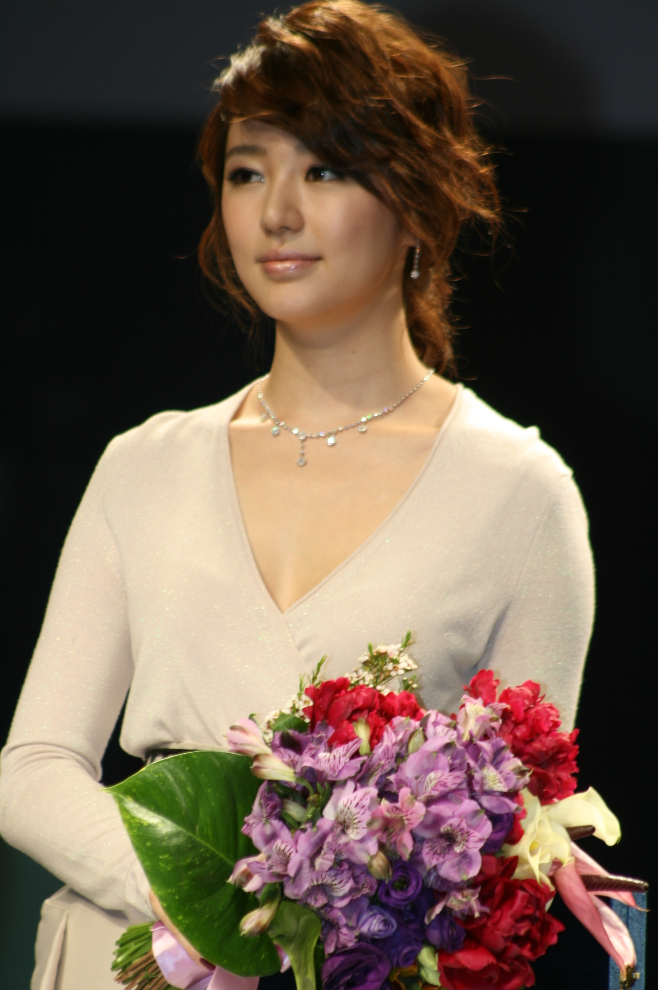 사진 105